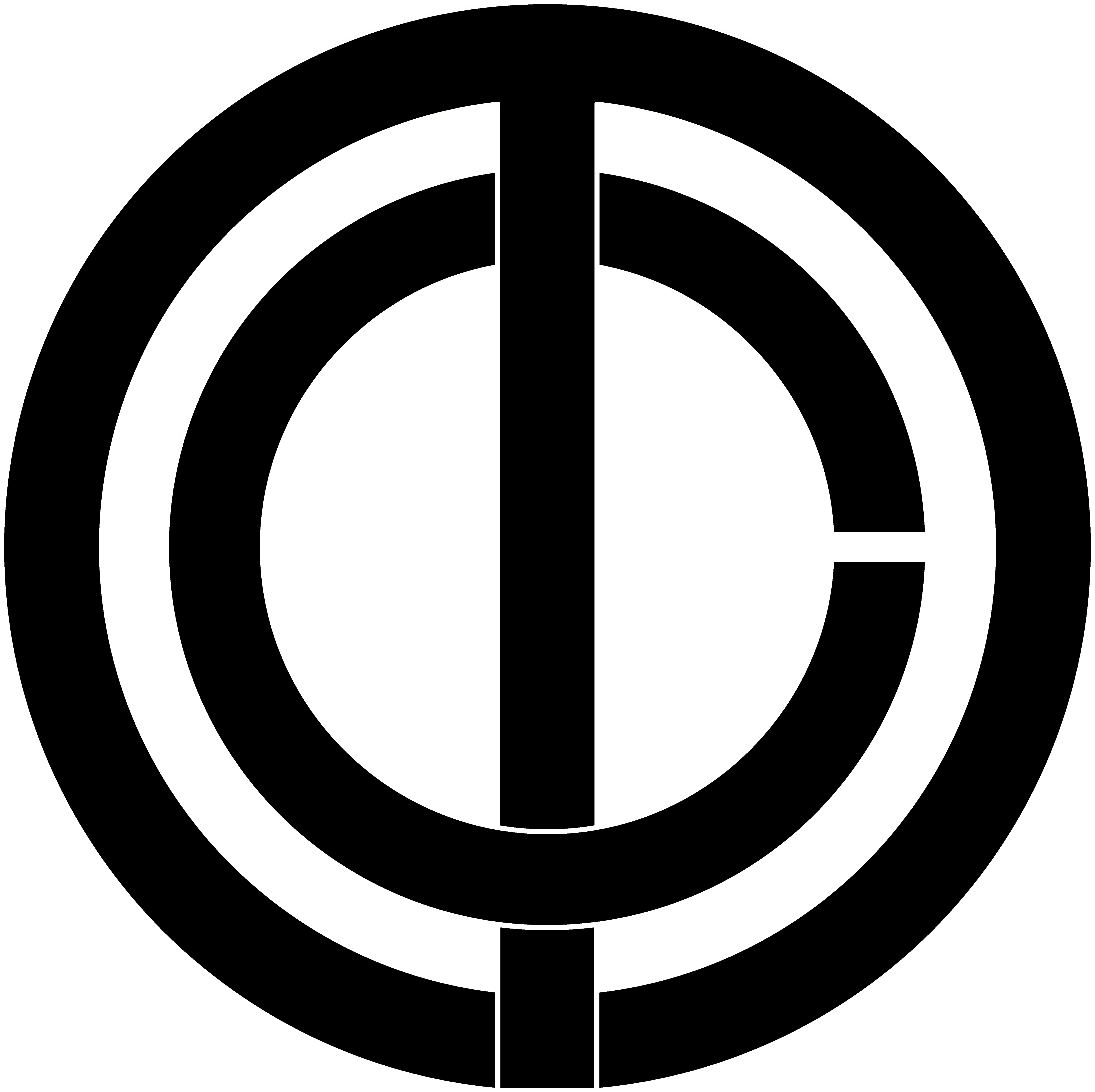 東京地下鉄道の社章